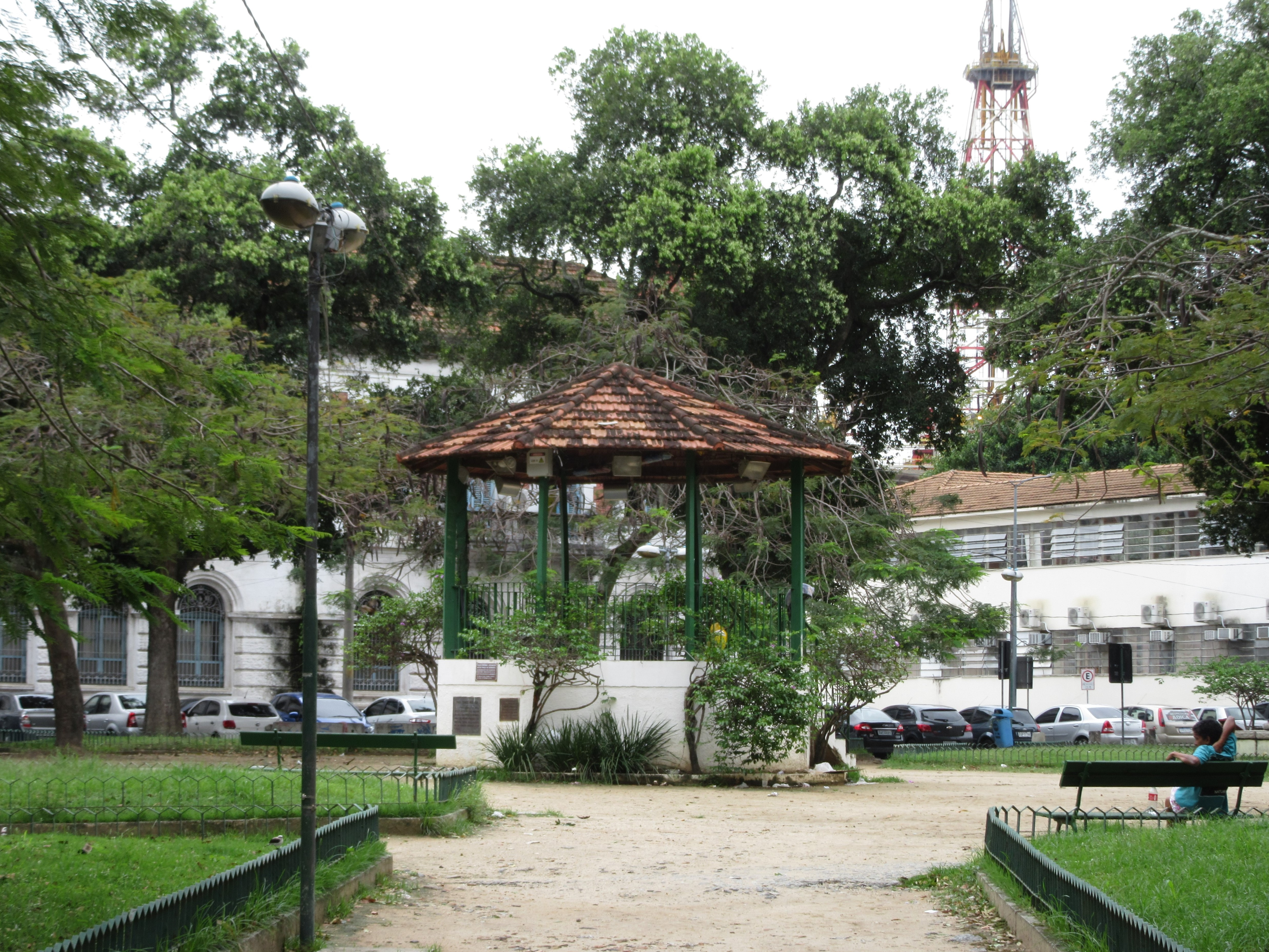 La Plaza de la Armonía, oficialmente Plaza Coronel Assunção (en portugués Praça da Harmonia y Praça Coronel Assunção), es una plaza situada en el barrio Gamboa, en la Zona Céntrica de la ciudad de Río de Janeiro. Se localiza en la manzana formada por las calles Antônio Lage y Sacadura Cabral, que la conecta con la avenida Rio Branco. Al lado de la plaza, se encuentra la estación Harmonia de la Línea 1 del tranvía de Río.